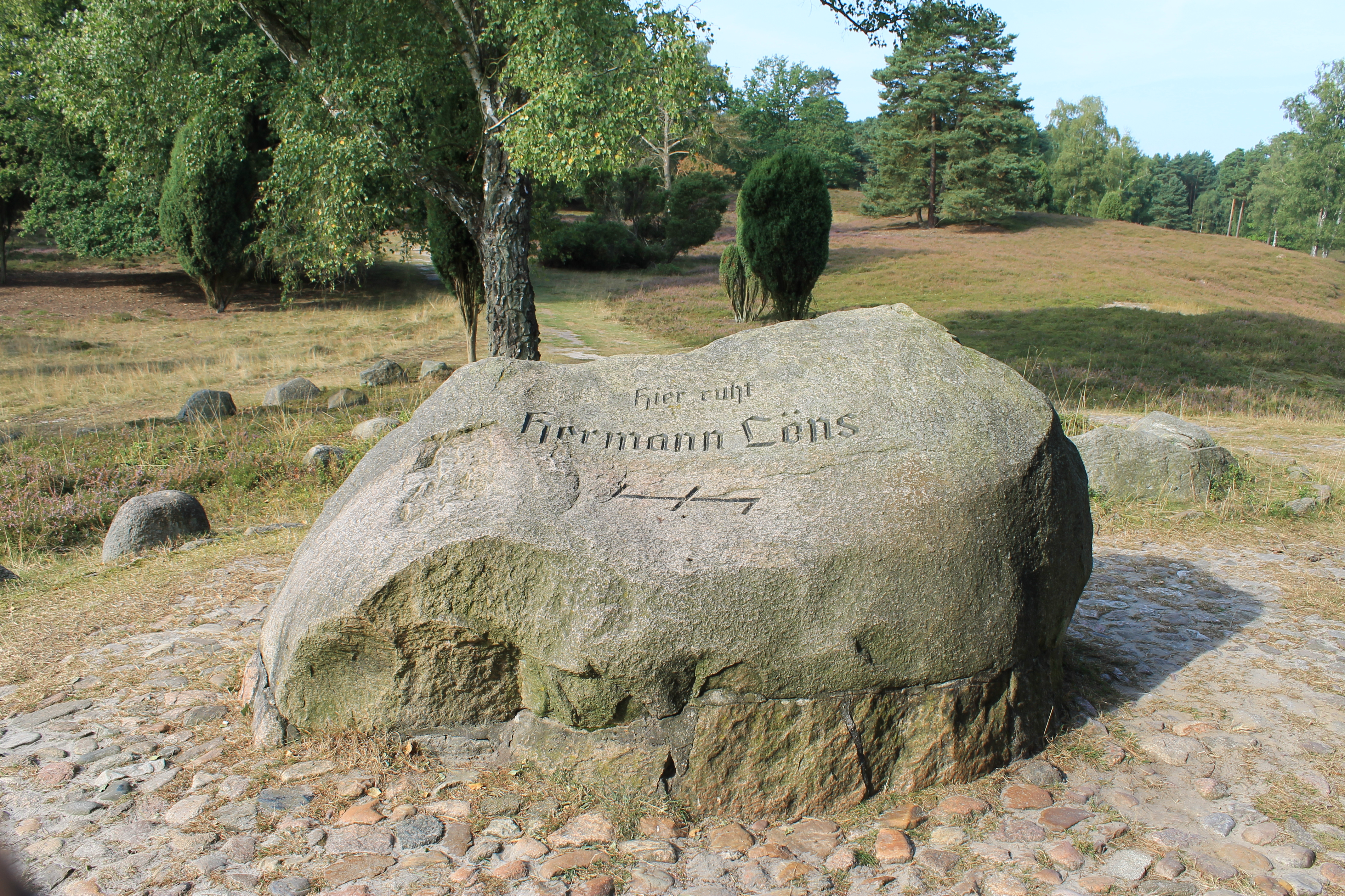 In unmittelbarer Nähe (etwa 100m entfernt) des Denkmales steht der Grabstein von Hermann Löns. Als er im ersten Weltkrieg in Frankreich ums Leben kam, wurden seine sterblichen Überreste in die Heide zurückgebracht, wo er seine letzte Ruhe fand.